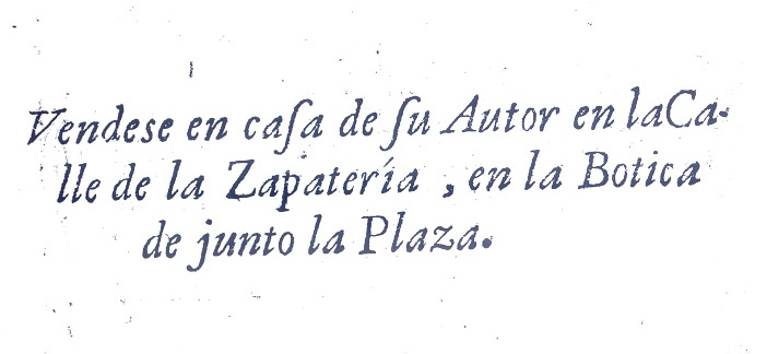 lugar donde se vende el libro viñaburu